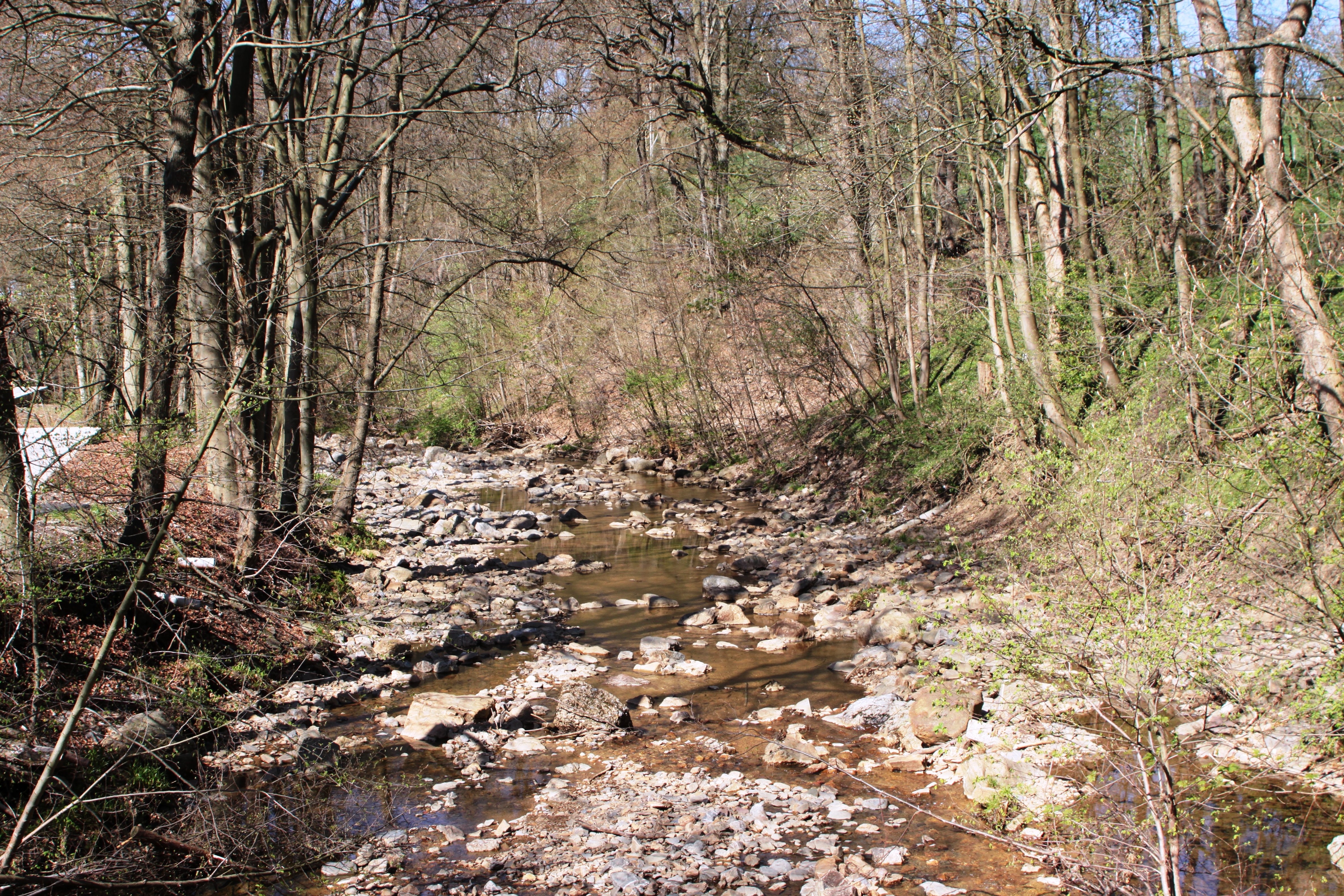 La Helle à Eupen au Quartier Hütte